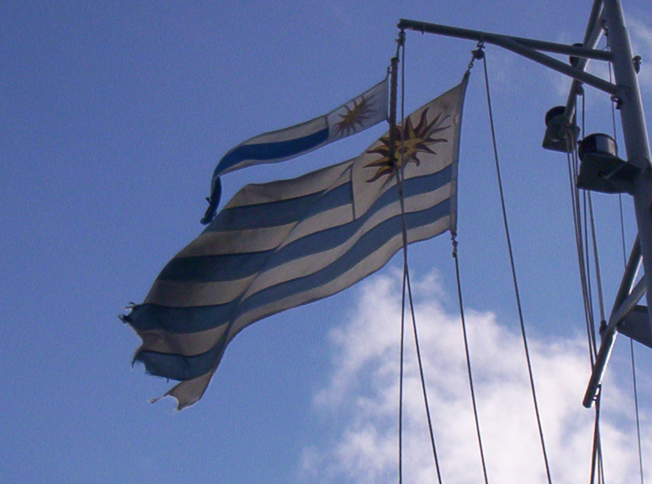 Bandera y gallardete Uruguay - Rou 21 Sirius